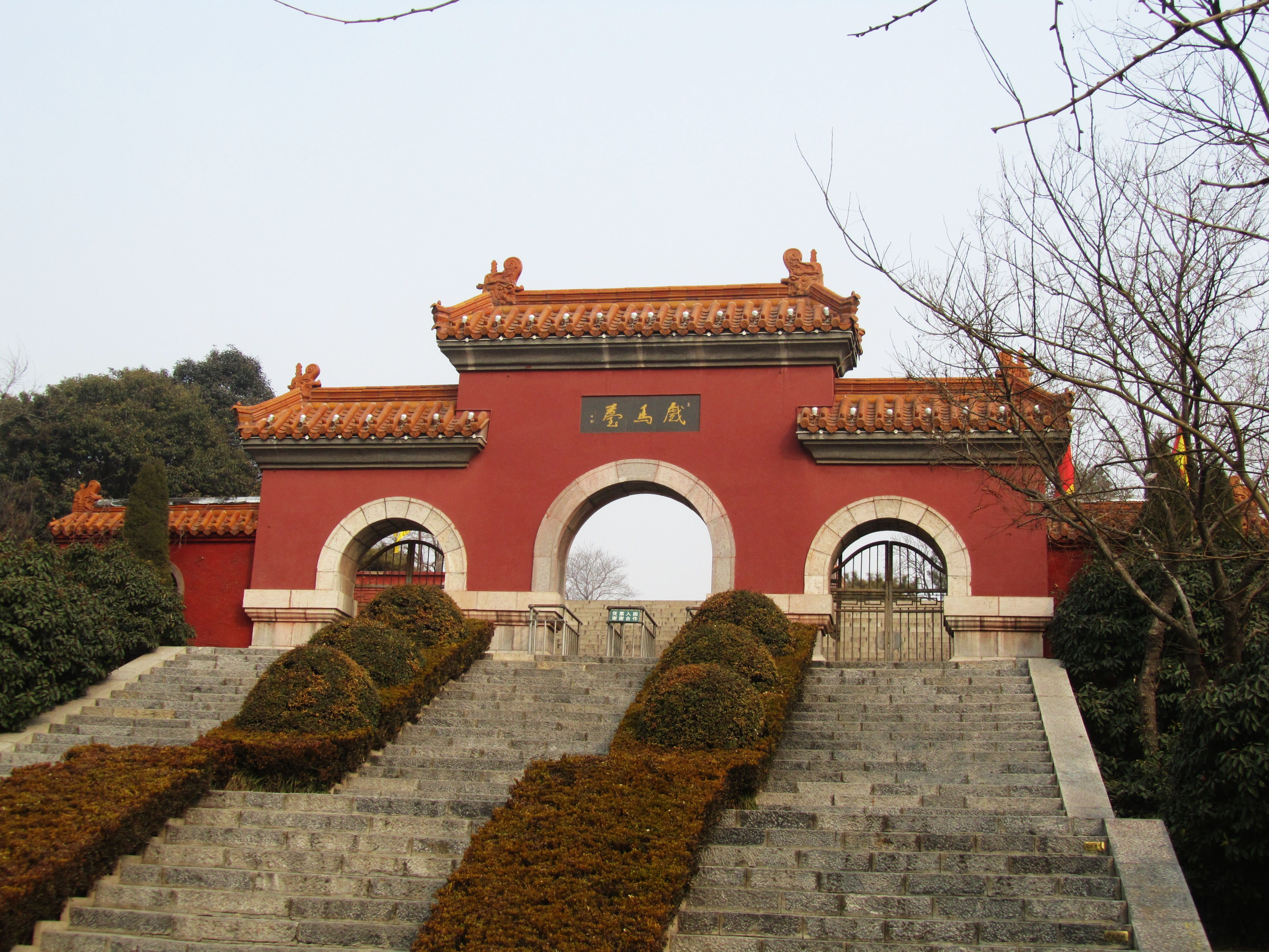 徐州戏马台。